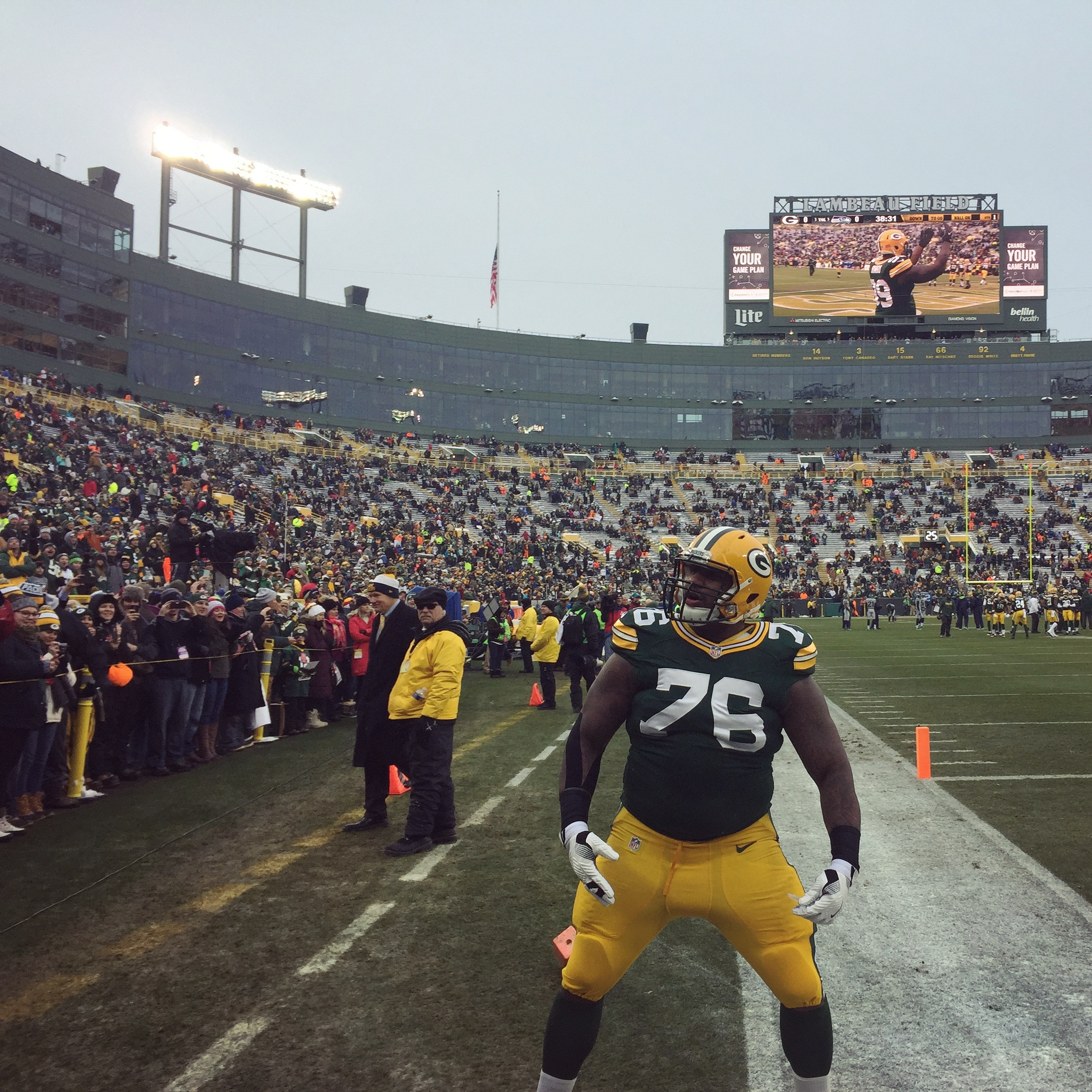 December 11, 2016